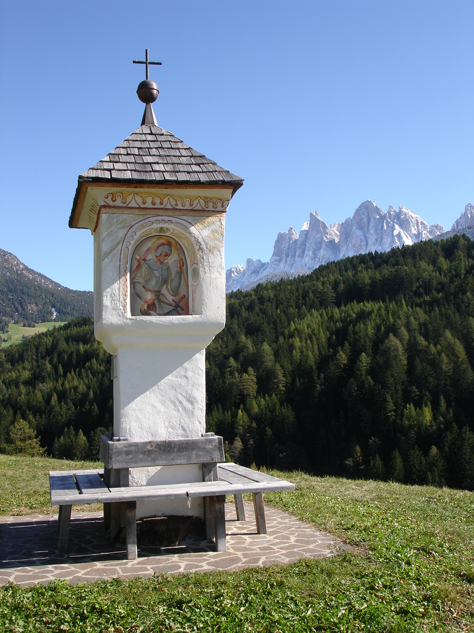 Bildstock in St. Peter im Vilnößtal in Südtirol